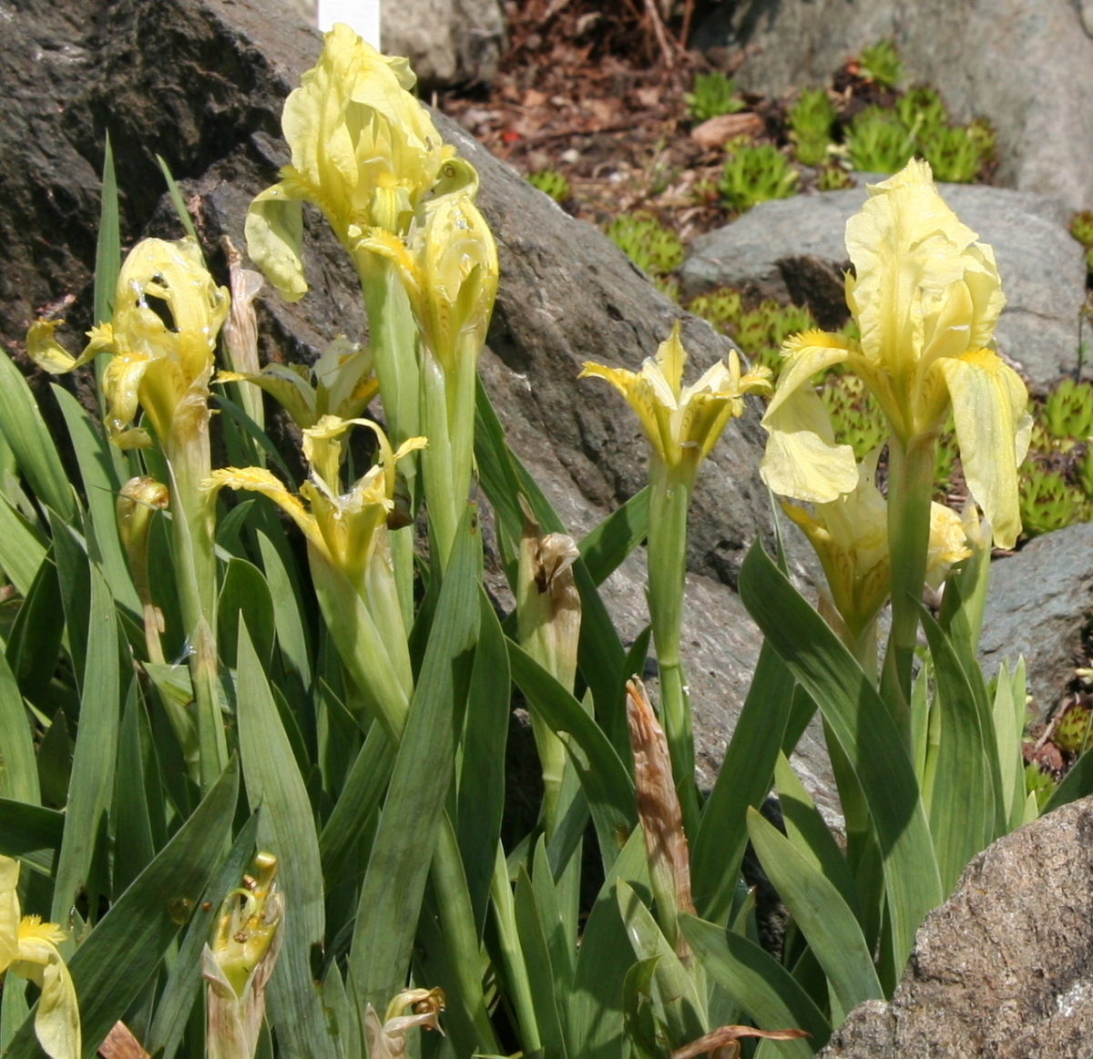 Iris reichenbachii im Botanischen Garten Dresden